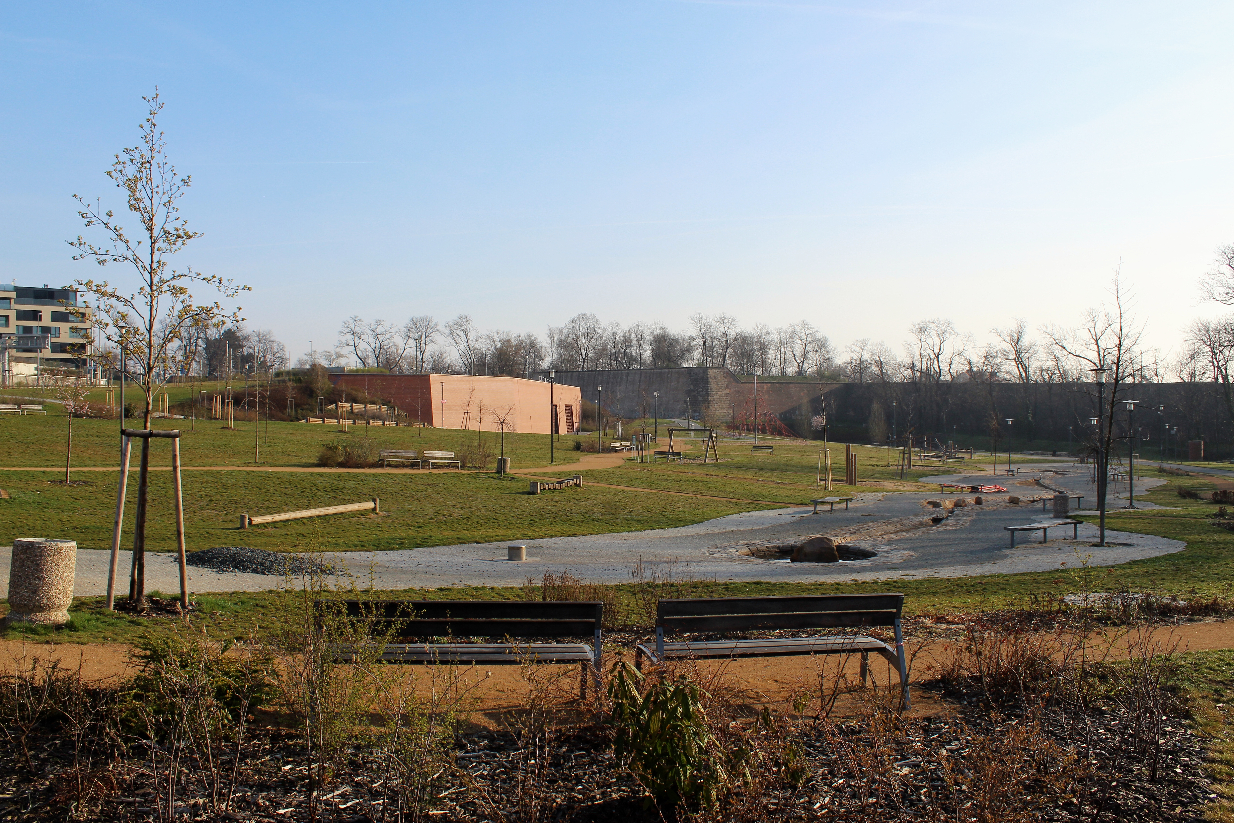 Praha